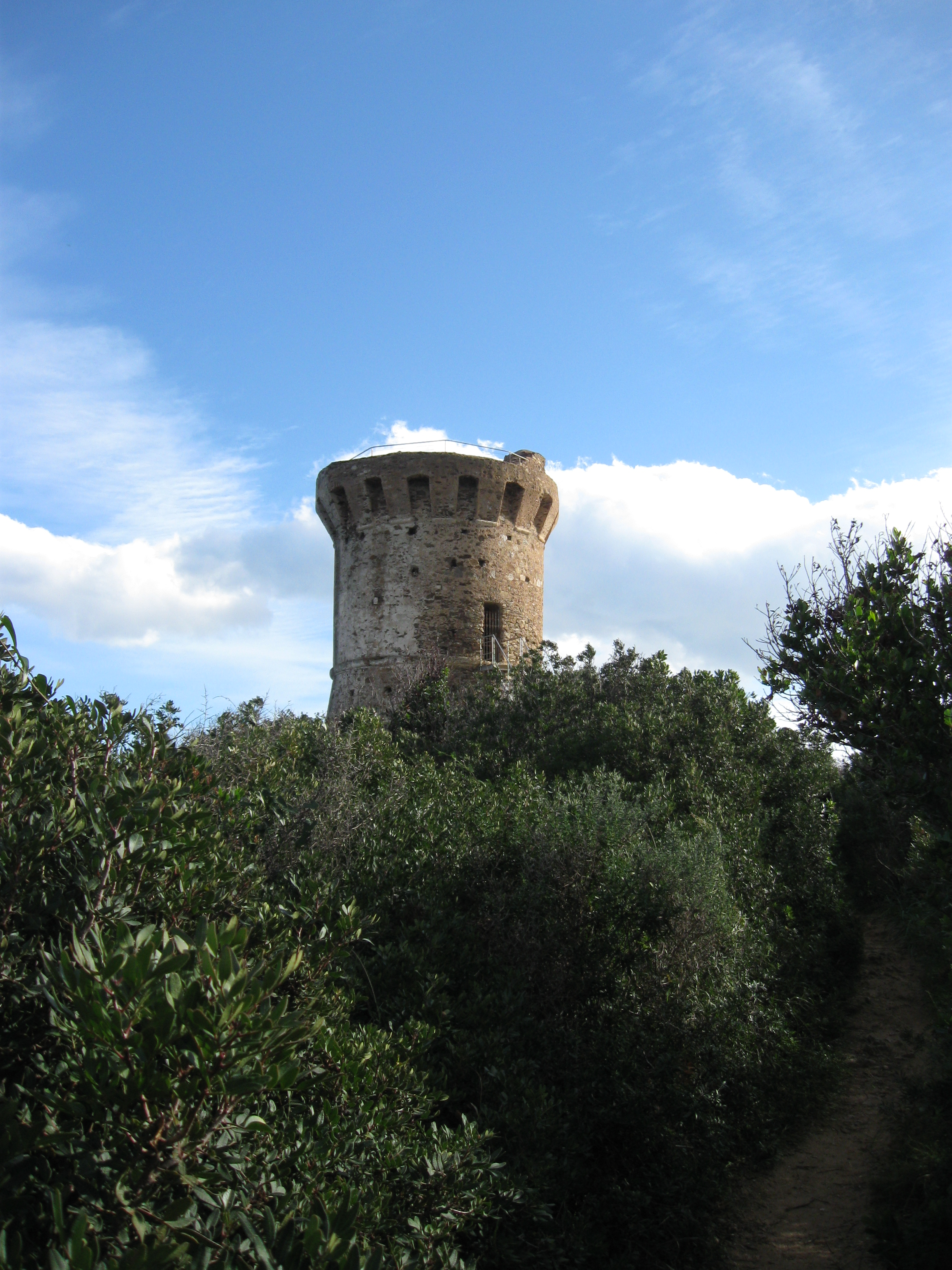 Tour de Fautea Corsu: Torra di Fautea